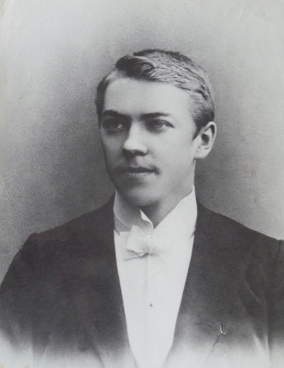 Jindřich Prucha (1886-1914), český malíř